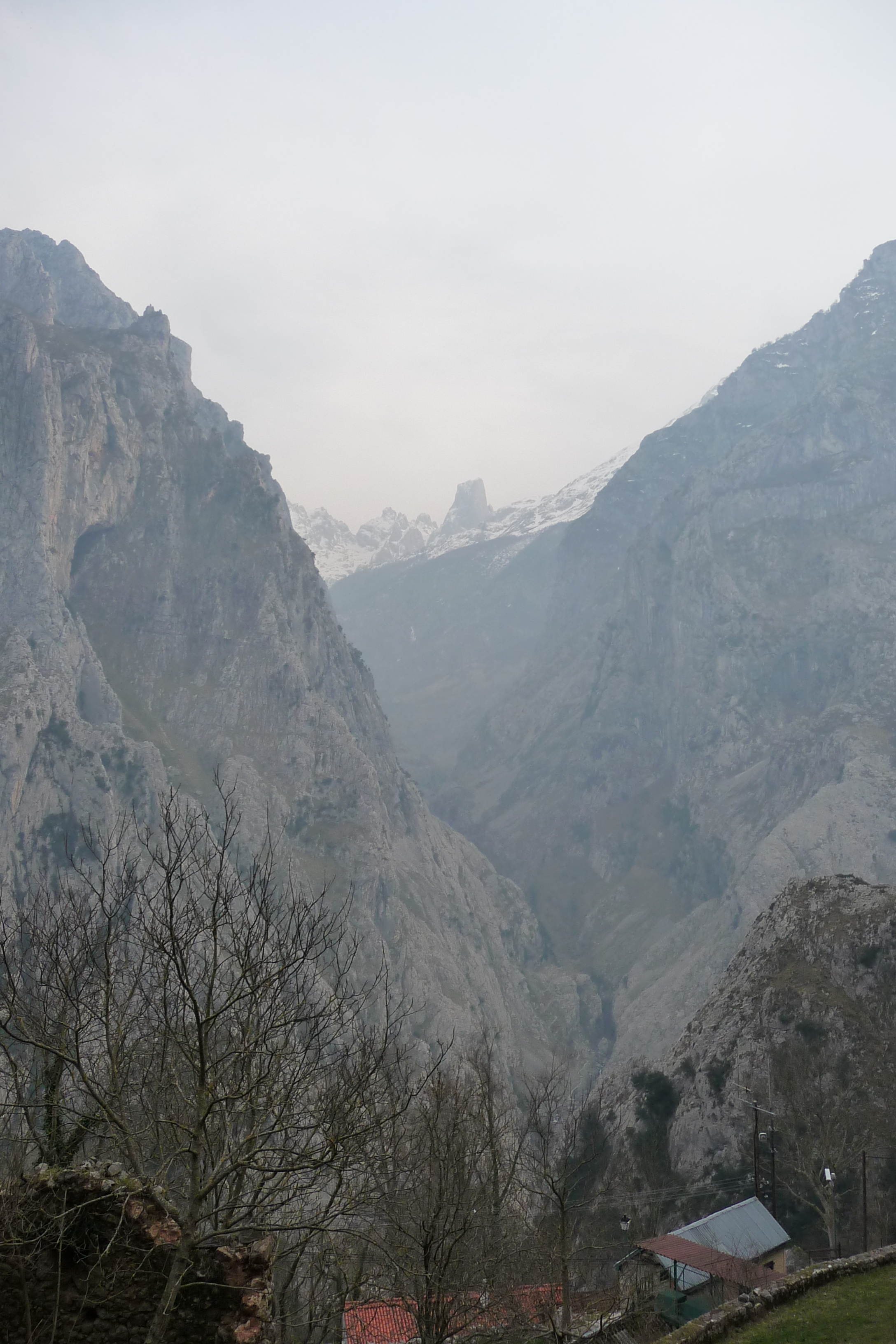 Picos de Europa This is a photography of a Site of Community Importance in Spain with the ID: ES1200001. Natura2000 entry, EEA entry